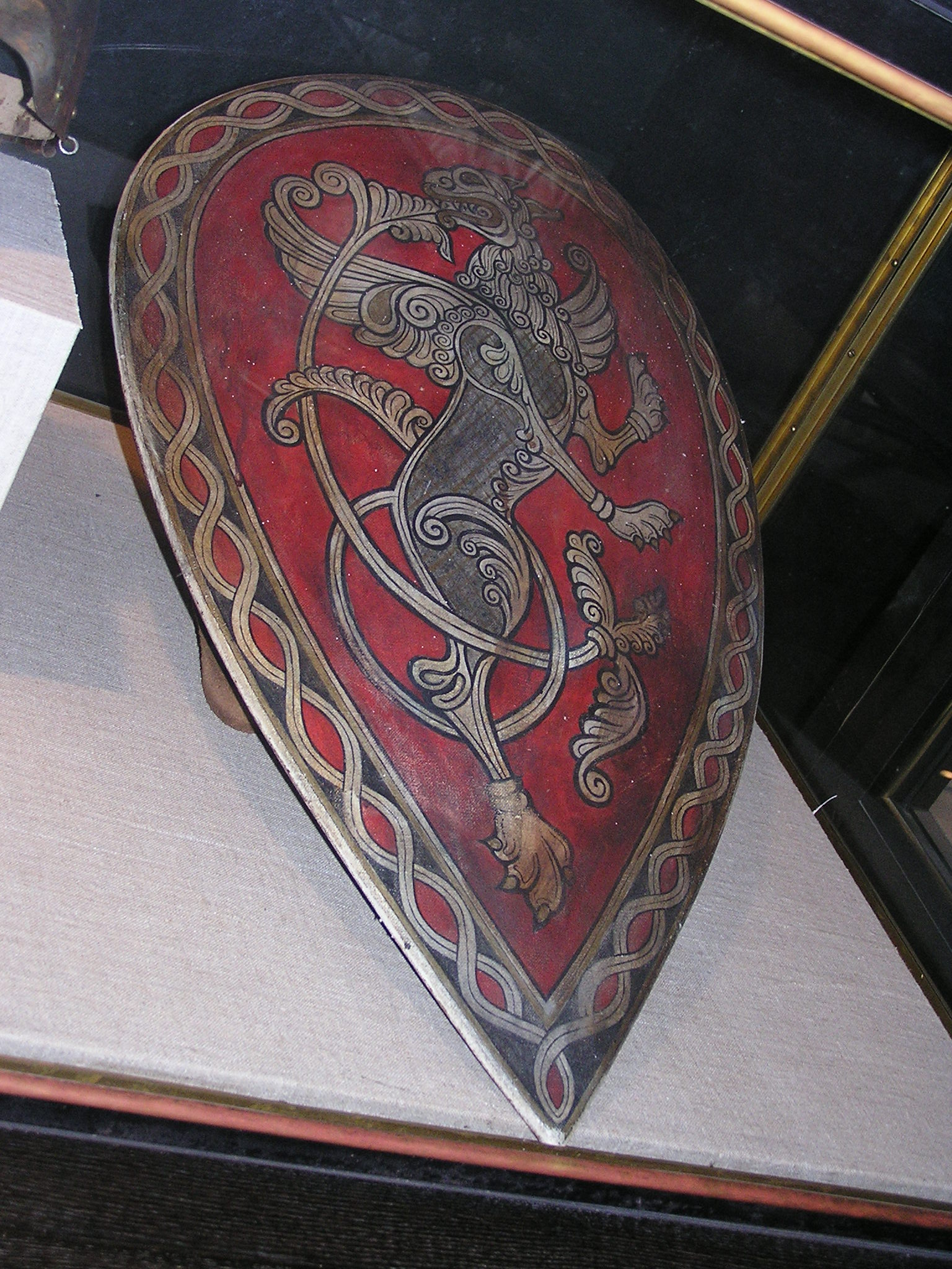 Санкт-Петербург. Петропавловская крепость. Комендантский дом. Государственный музей истории Санкт-Петербурга. "Петербург - Петроград. 1703-1918 гг." Красный щит